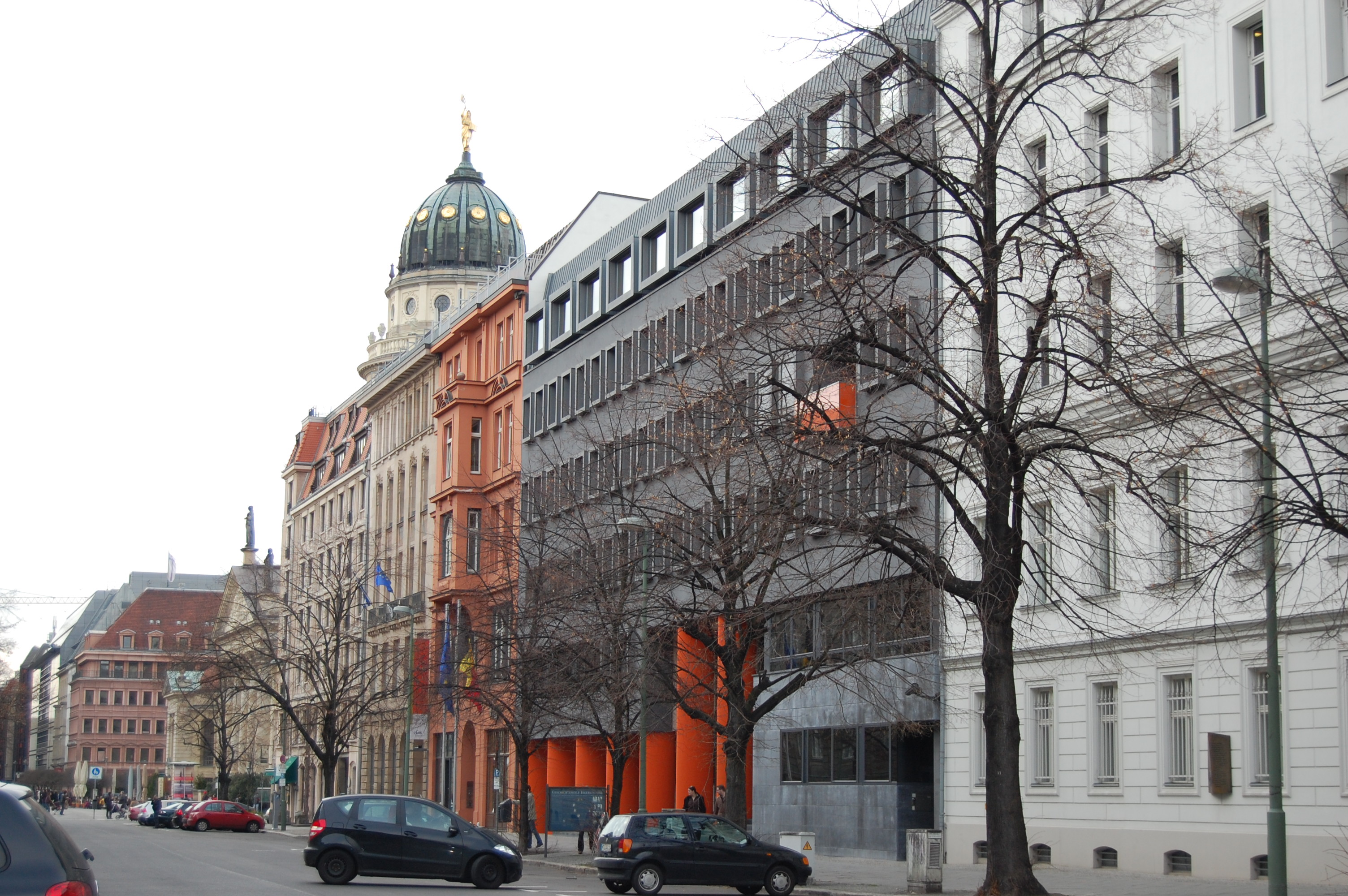 Belgian Embassy in Berlin